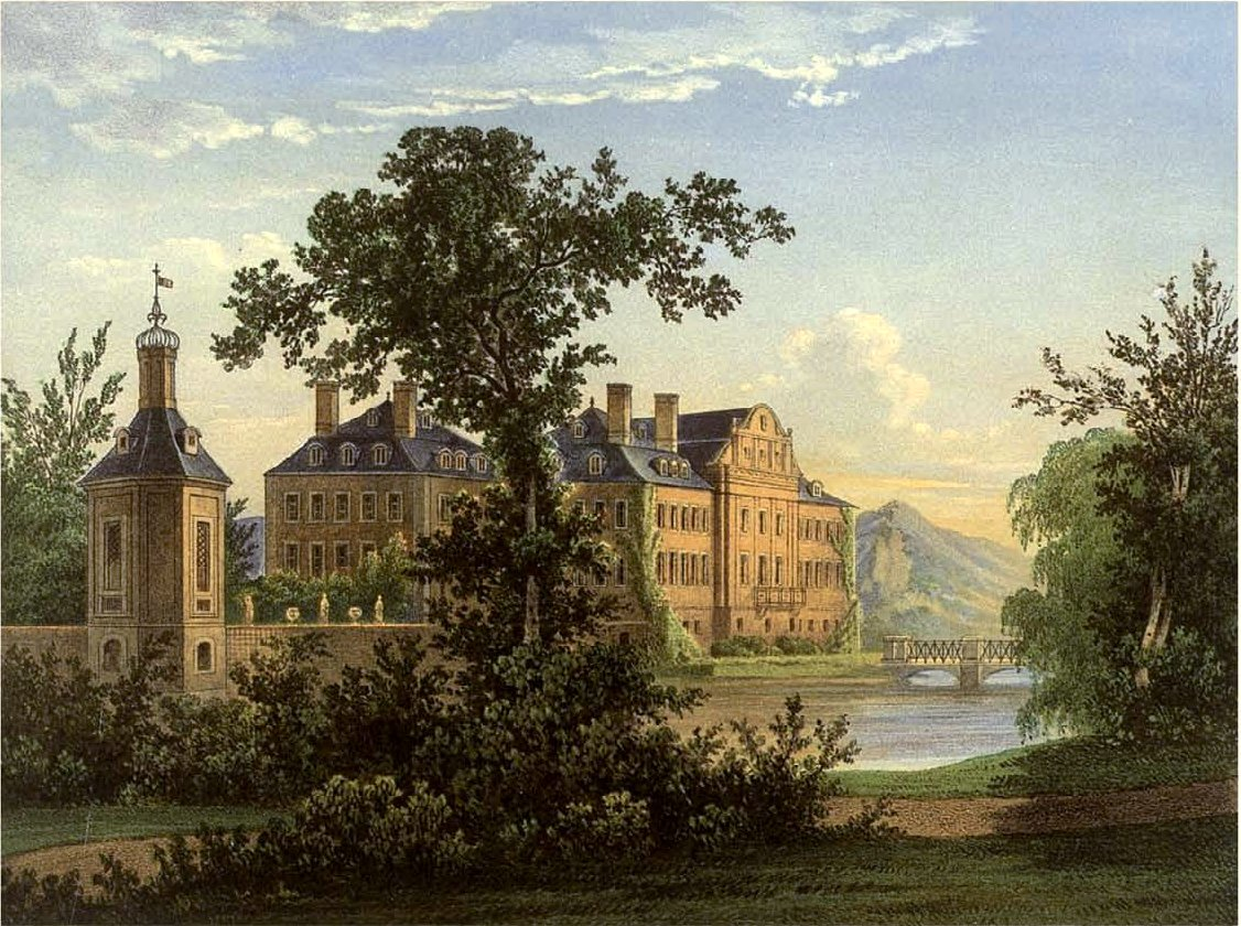 Schloss Nordkirchen